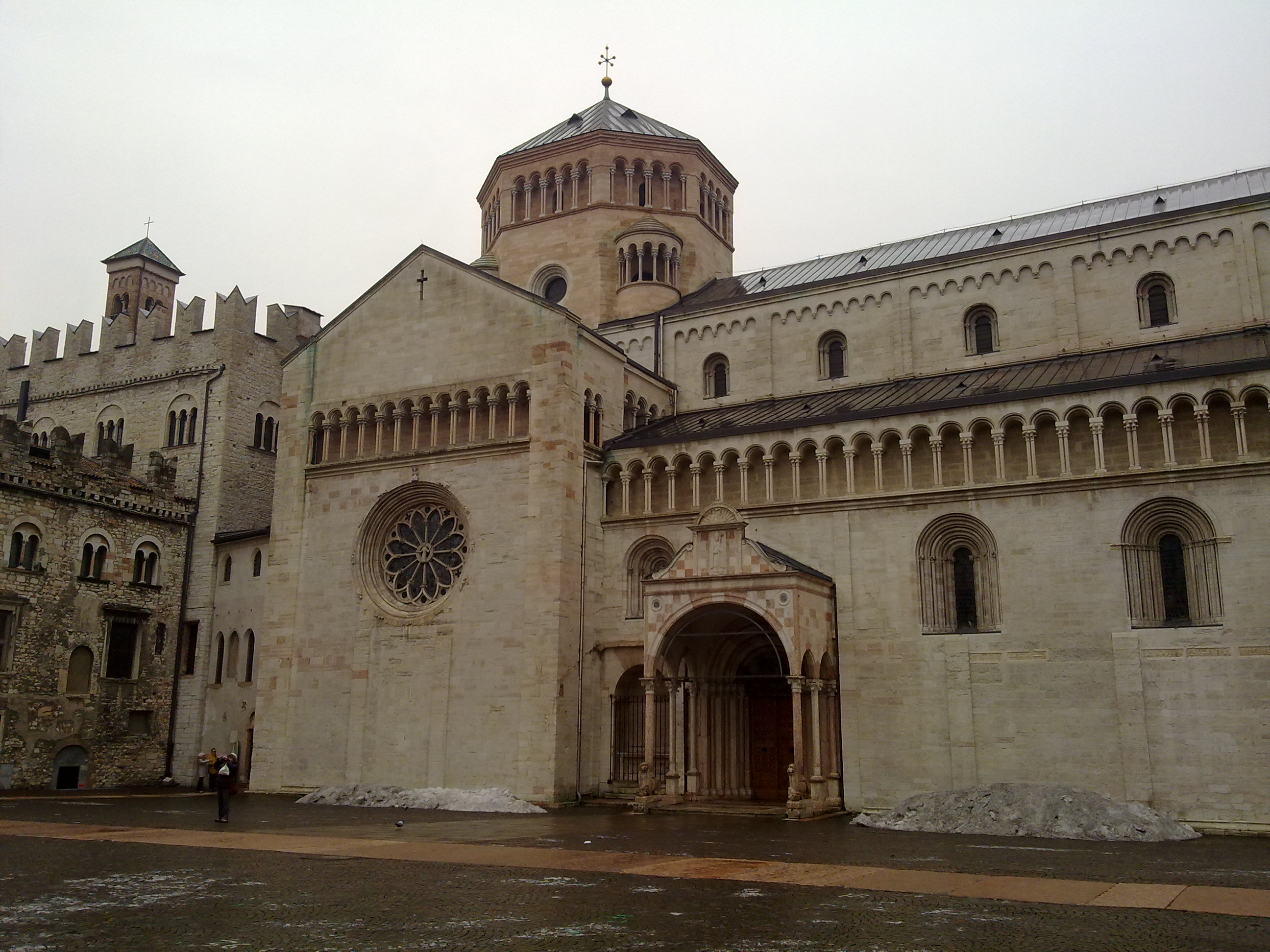 Trento - Il duomo